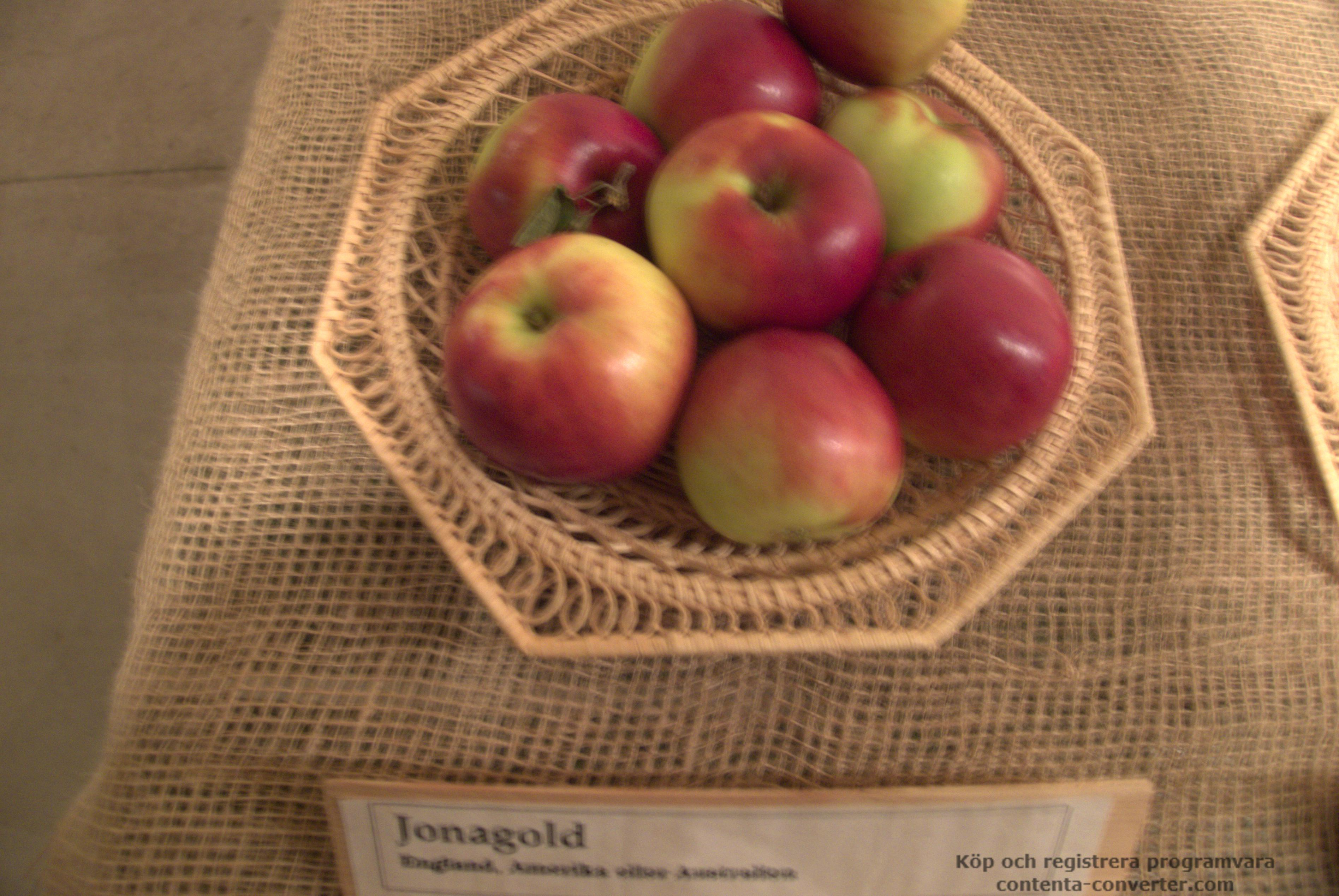 Äpplen av sorten Jonagold